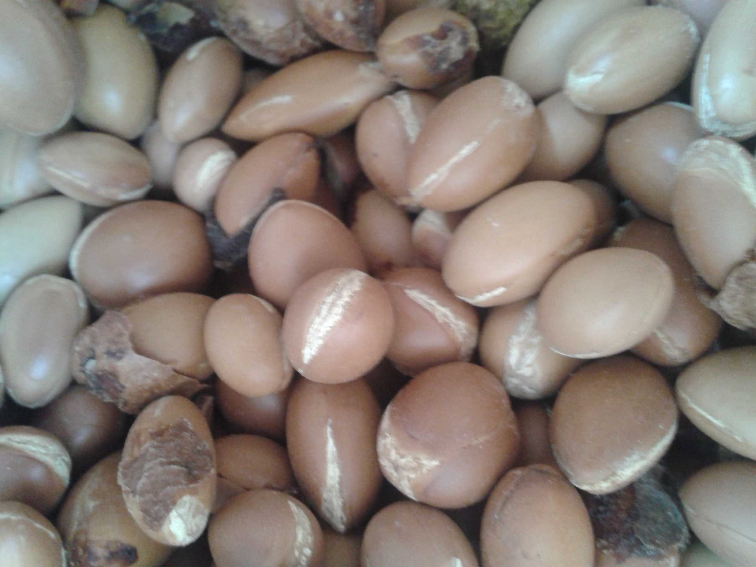 Les noyaux des fruits de l arganier sont très durs et difficils à écraser